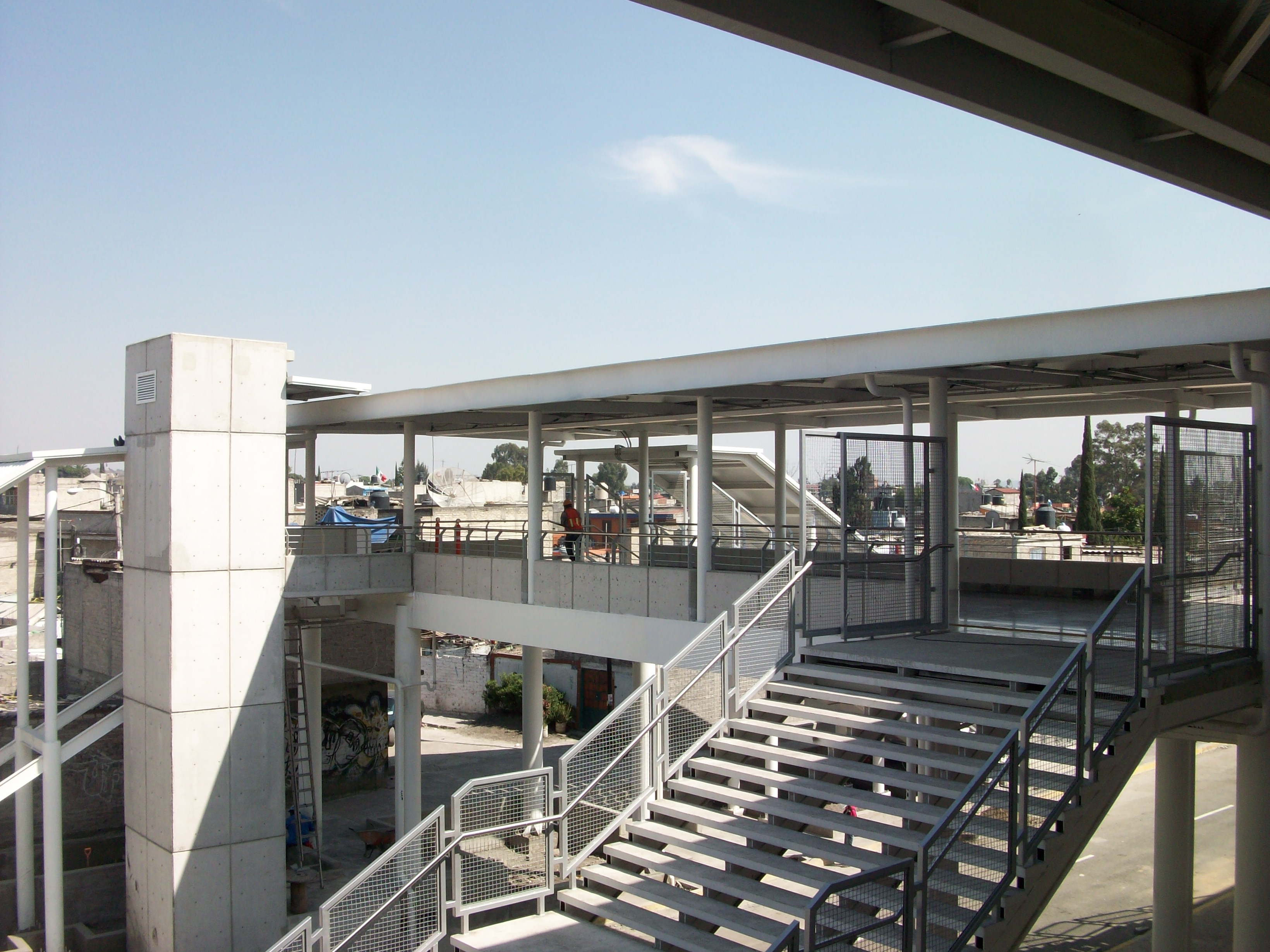 Acceso estacion Tlaltenco